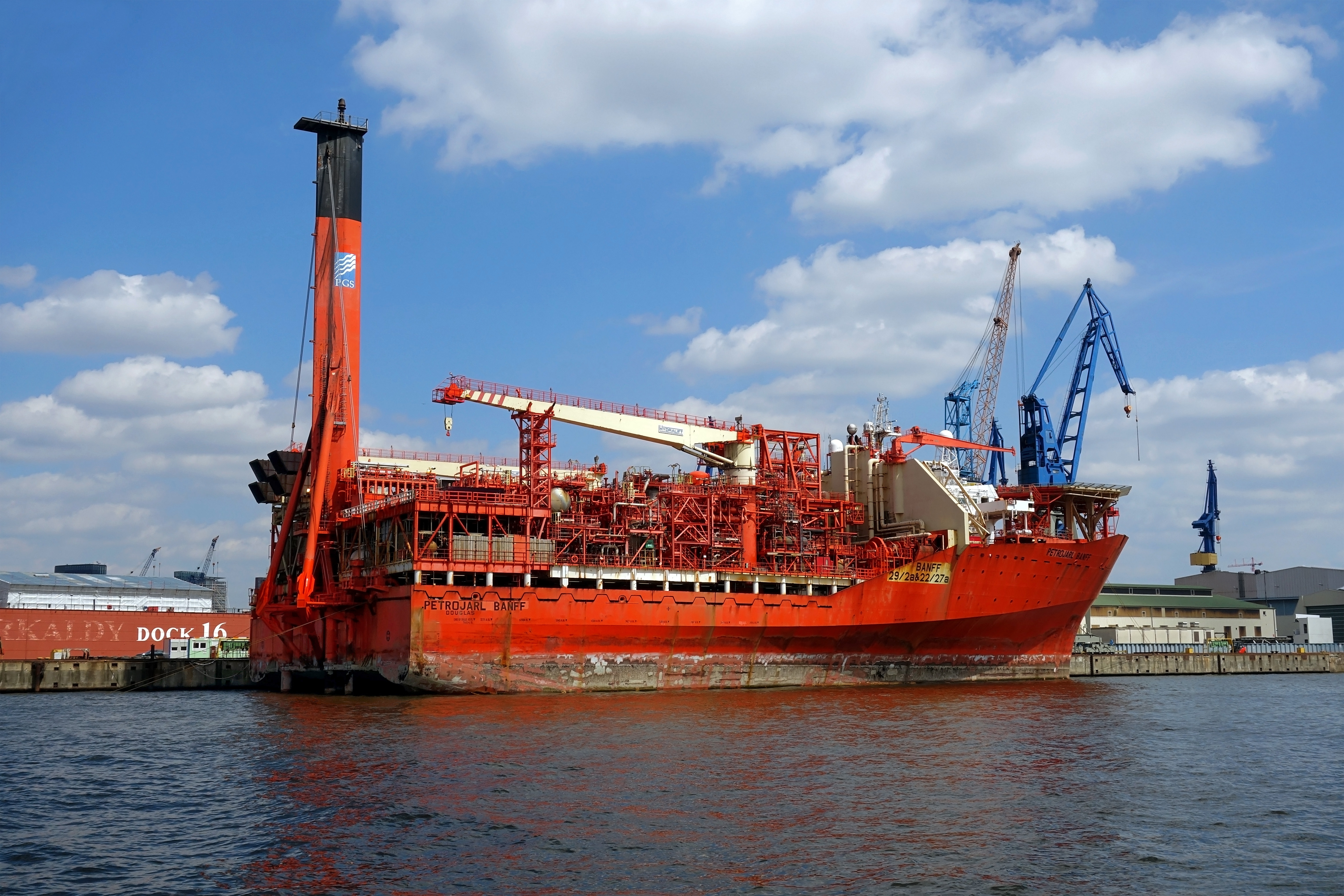 Die Petrojarl Banff beim Dock von Blohm + Voss im Hamburger Hafen. Die Petrojarl Banff ist ein als Floating Production Storage and Offloading Unit bezeichnetes Schiff und hatte am 28. April 1997 Stapellauf.